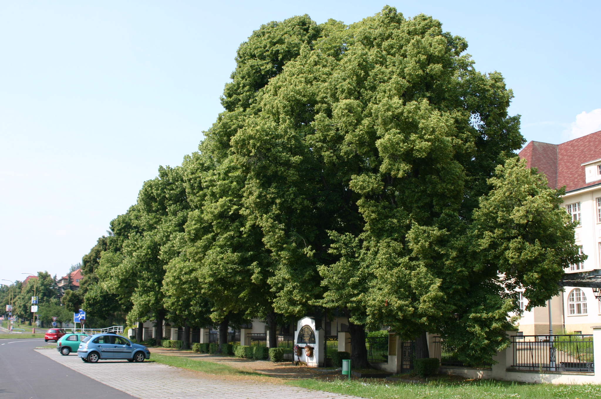 Chráněná lipová alej v Mostě